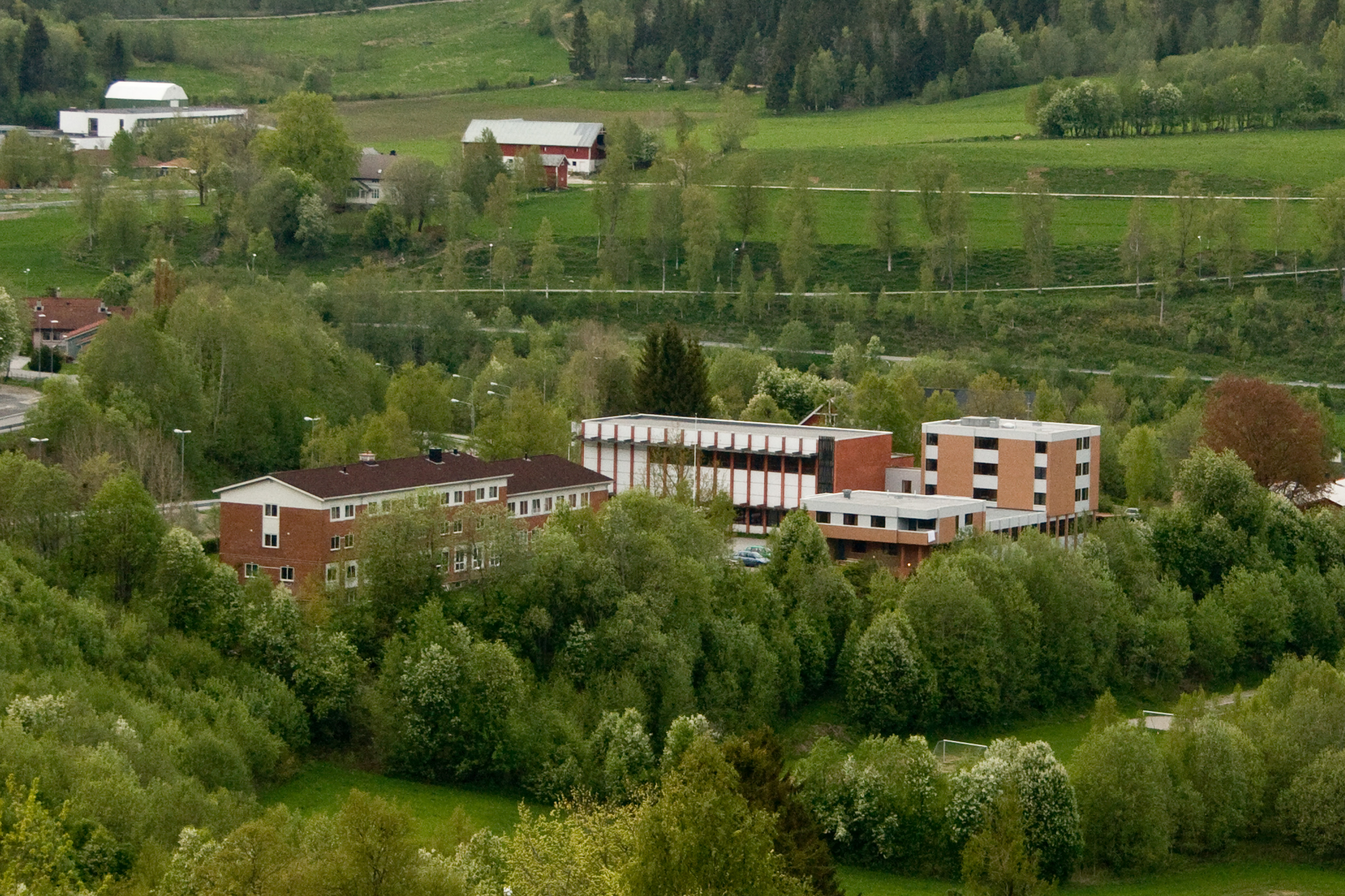 Norsk (bokmål):Nordmøre Folkehøgskule i Surnadal